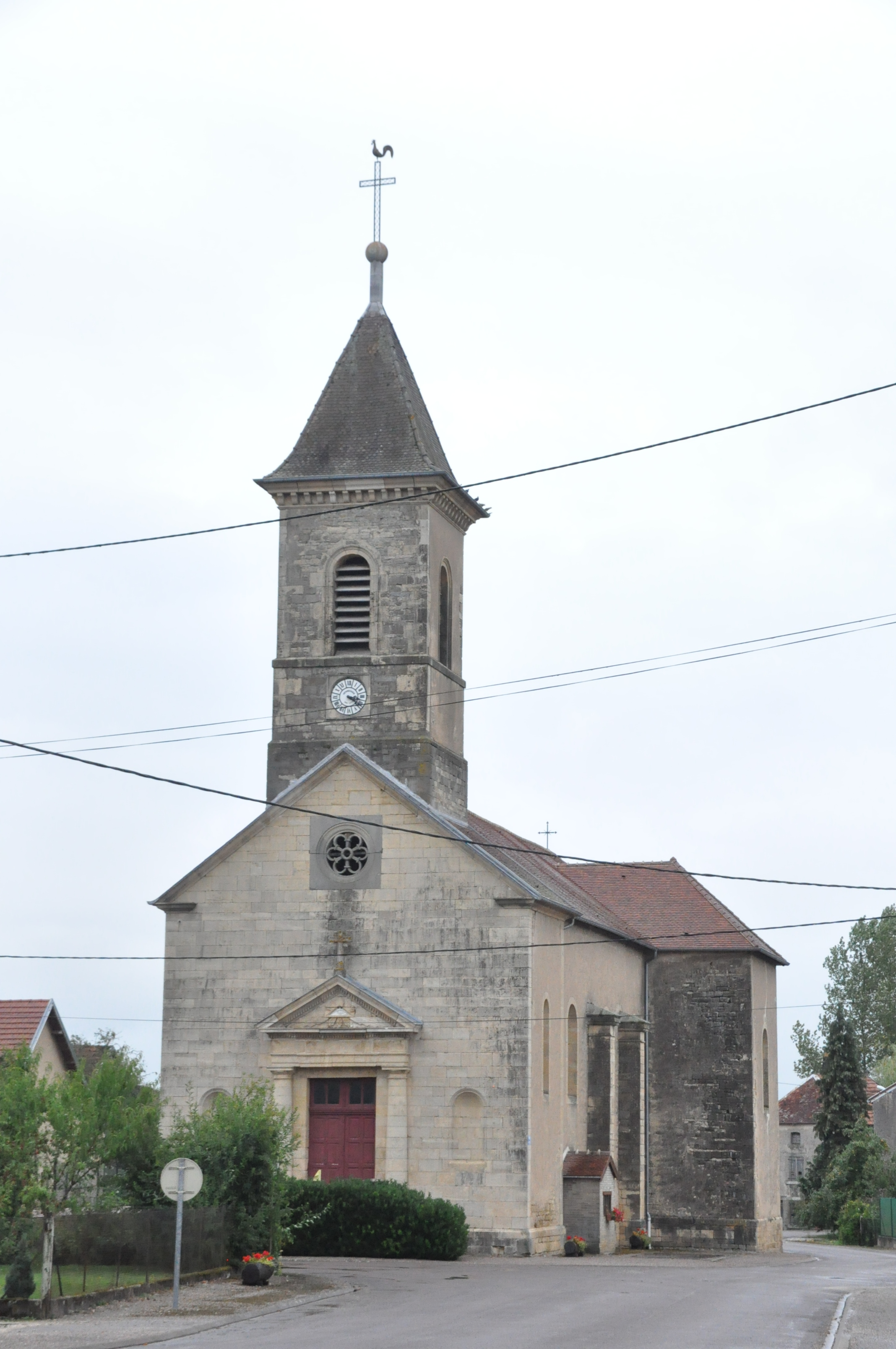 église de Bougey (Haute-Saône)